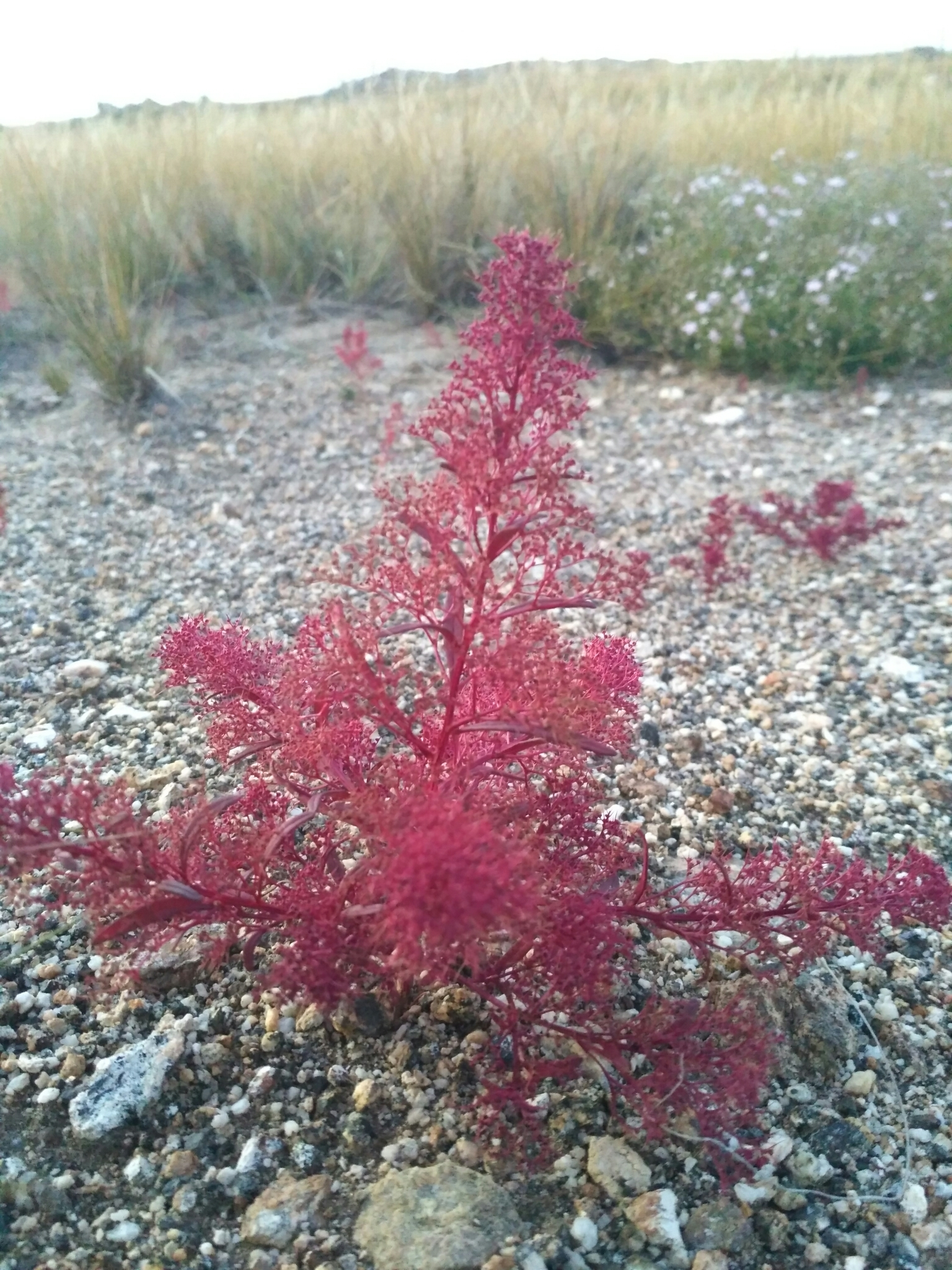 Телоксис остистая